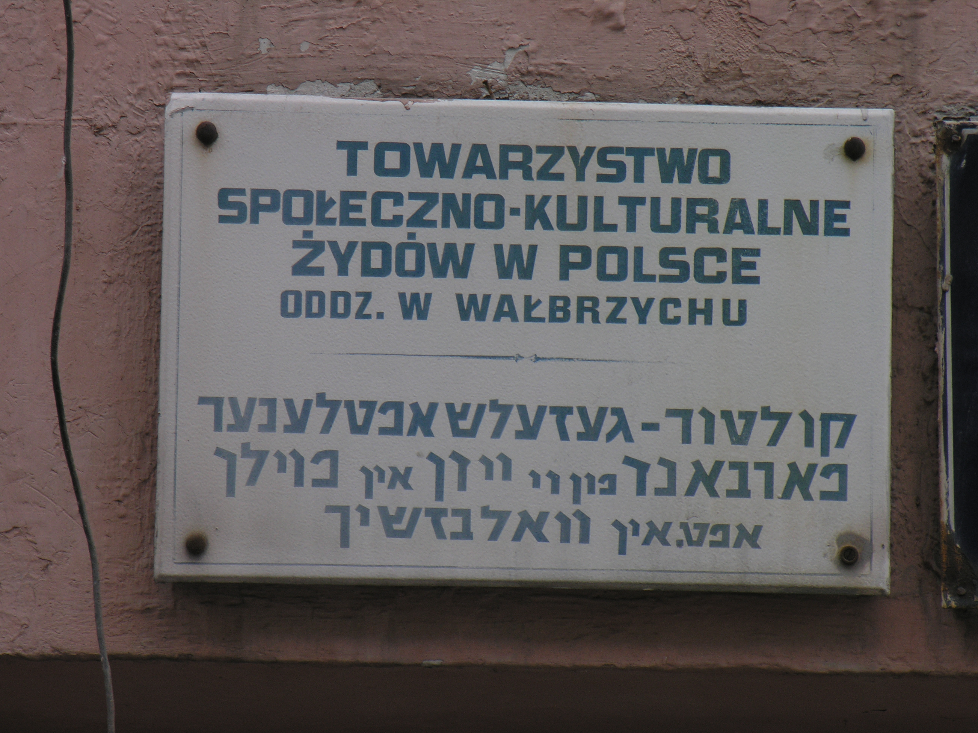 Tabliczka na siedzibie Towarzystwa Społeczno Kulturalnego Żydów w Wałbrzychu, ul. Moniuszki 13/15